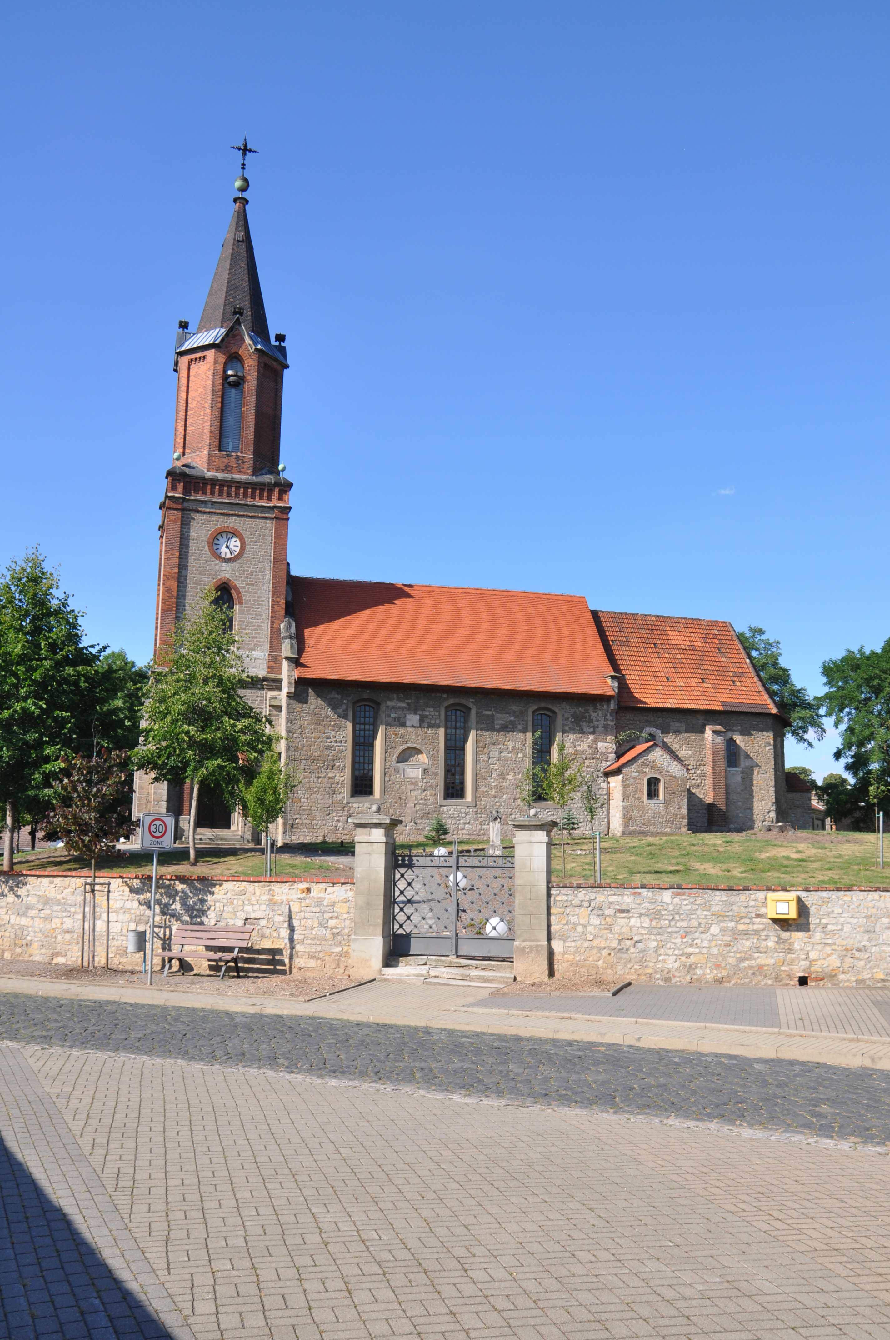 Aschersleben-Mehringen, St. Stephani